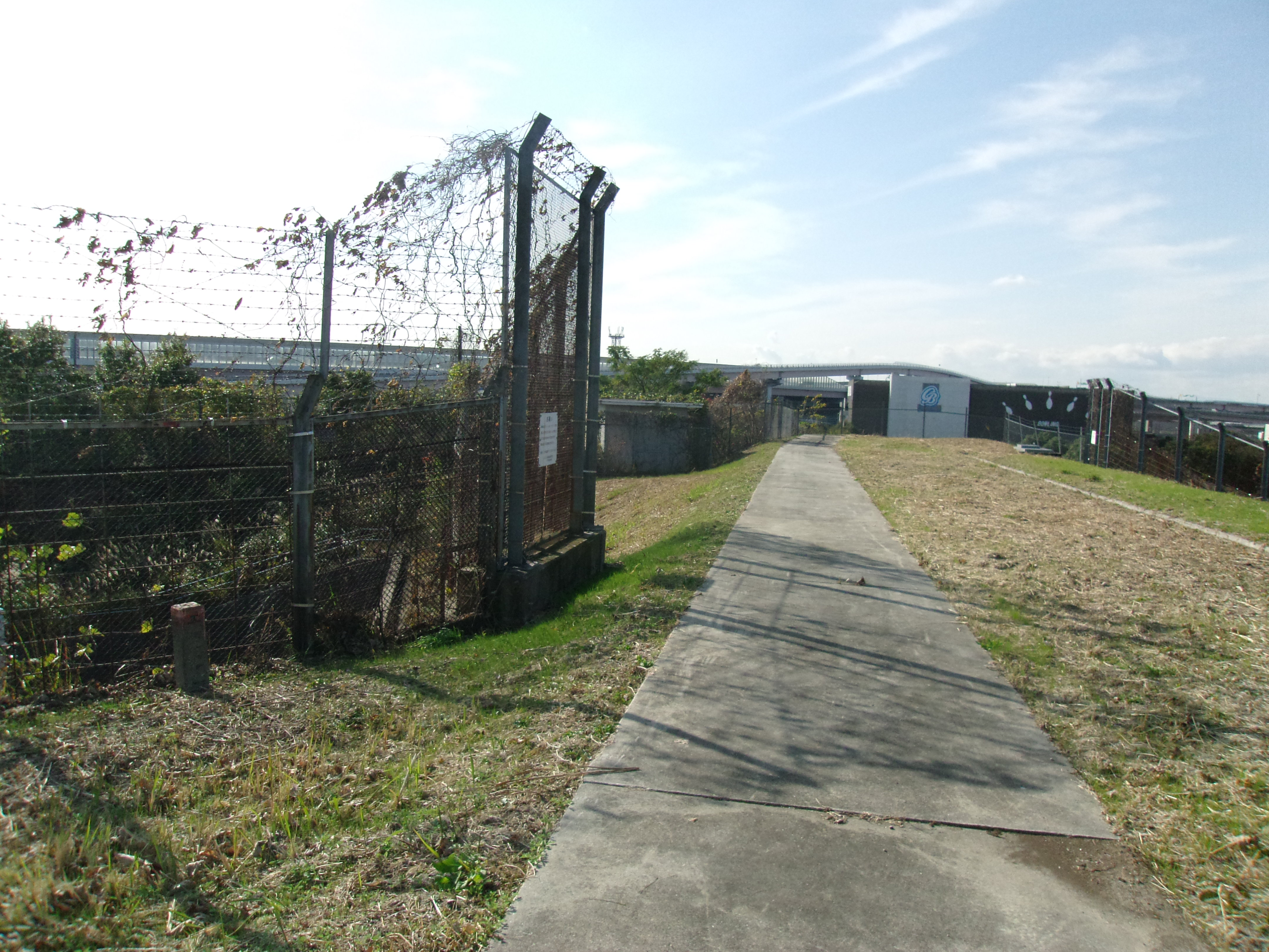 愛知用水が東海道新幹線の路線上を乗り越える水道橋（新幹線としては大高トンネルになる）の天端、用水は暗渠化されている